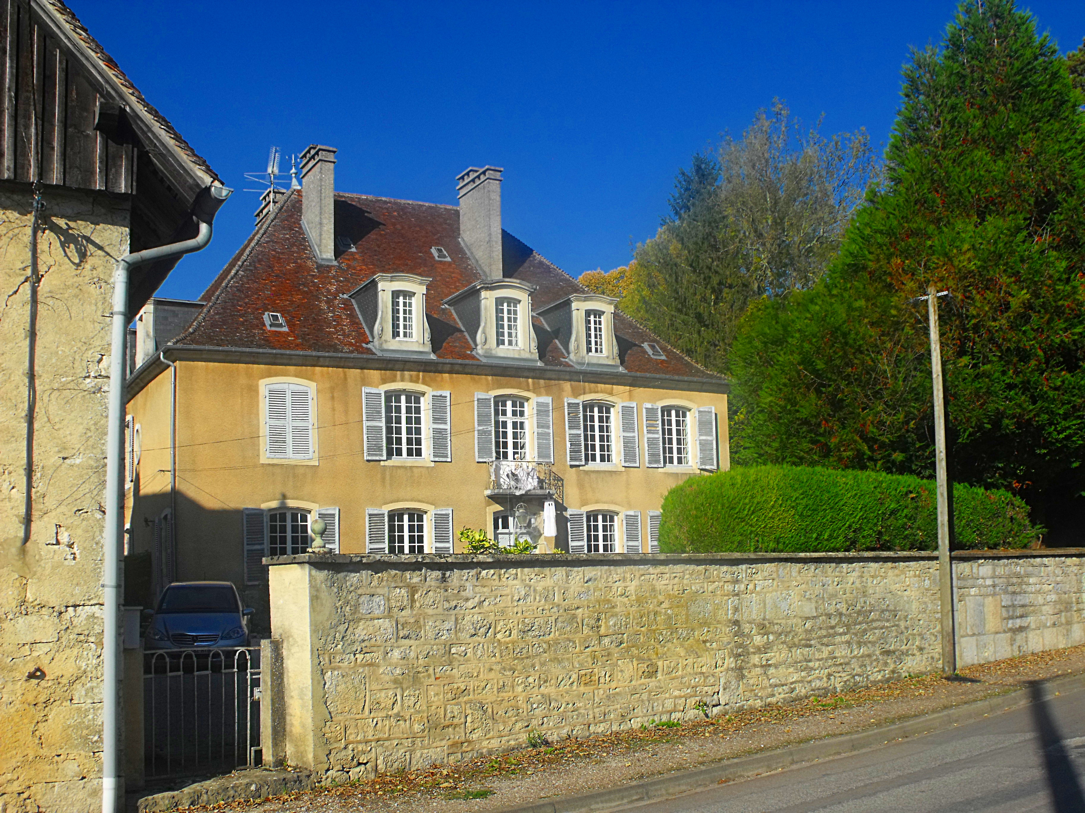 Château d'Arc à Arc-et-Senans, Doubs, France